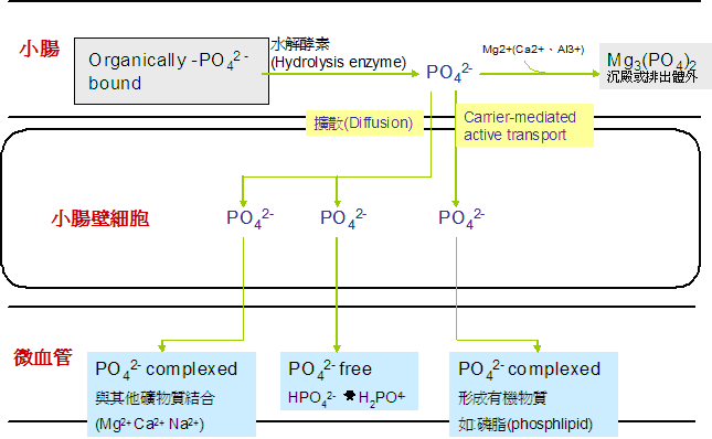 P 消化吸收